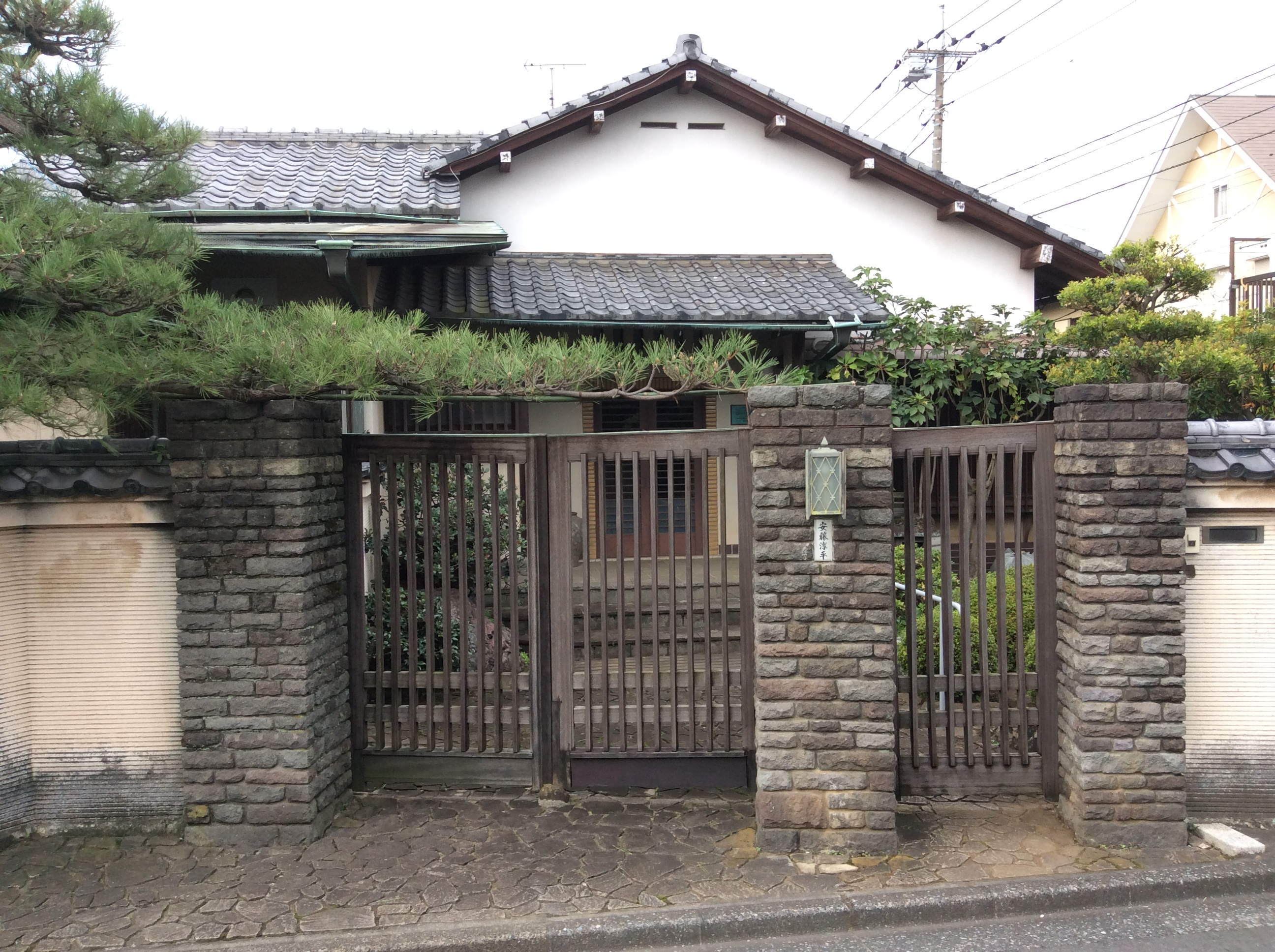 三鷹市 安藤家住宅